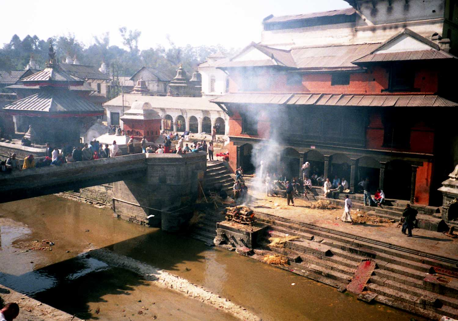 パシュパテイナート（Pashupatinath）パグマティ川火葬場俯瞰